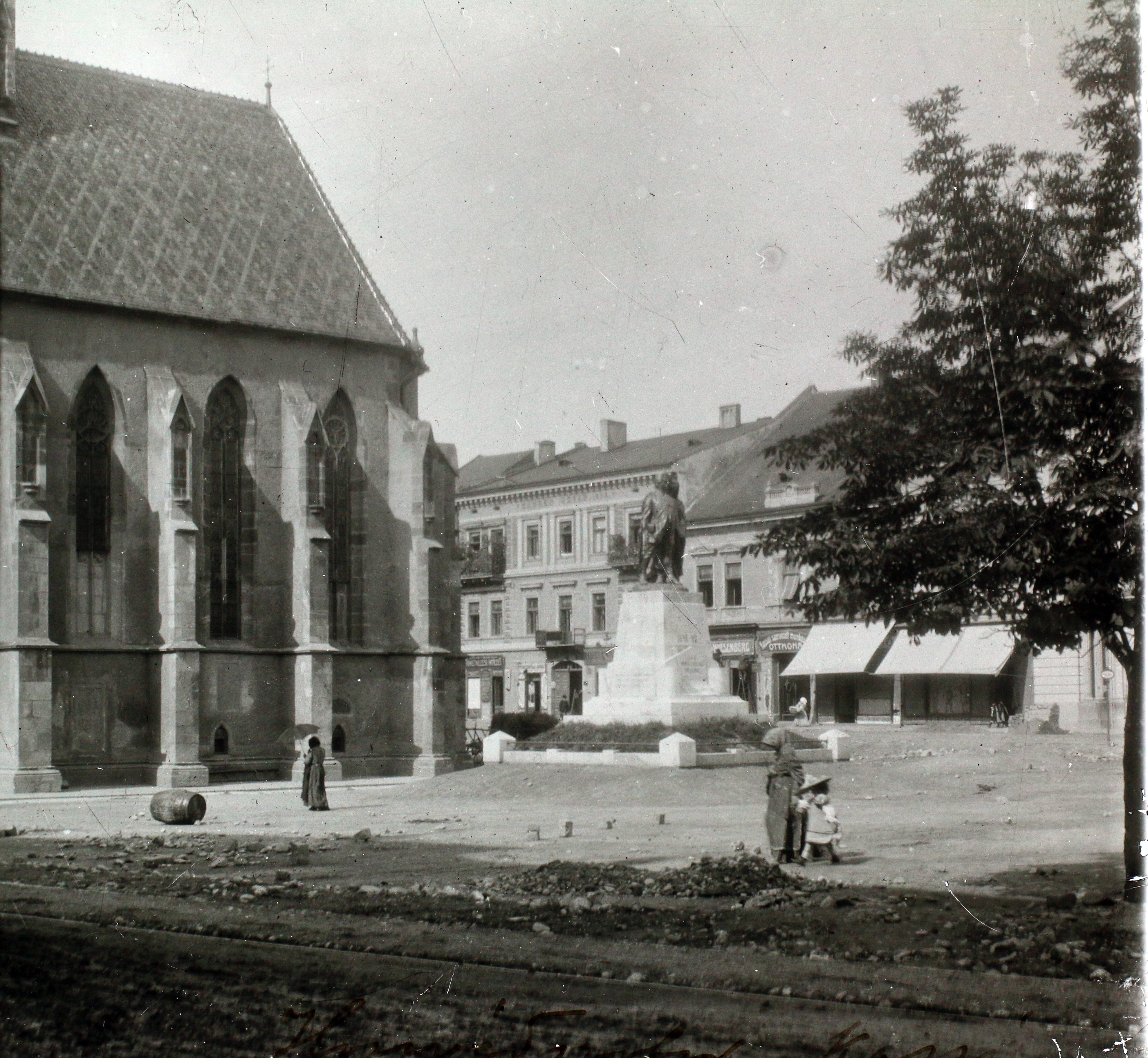 Fő tér (Hlavné namestie), balra a Szent Mihály-templom, jobbra a Honvéd-szobor (Horvay János, Szamovolszky Ödön, 1906.). Location: Slovakia, Kosice Tags: square, sculptural group, church, chapel, monument, awning, Gothic tracery, barrel Title: Fő tér (Hlavné namestie), balra a Szent Mihály-templom, jobbra a Honvéd-szobor (Horvay János, Szamovolszky Ödön, 1906.).